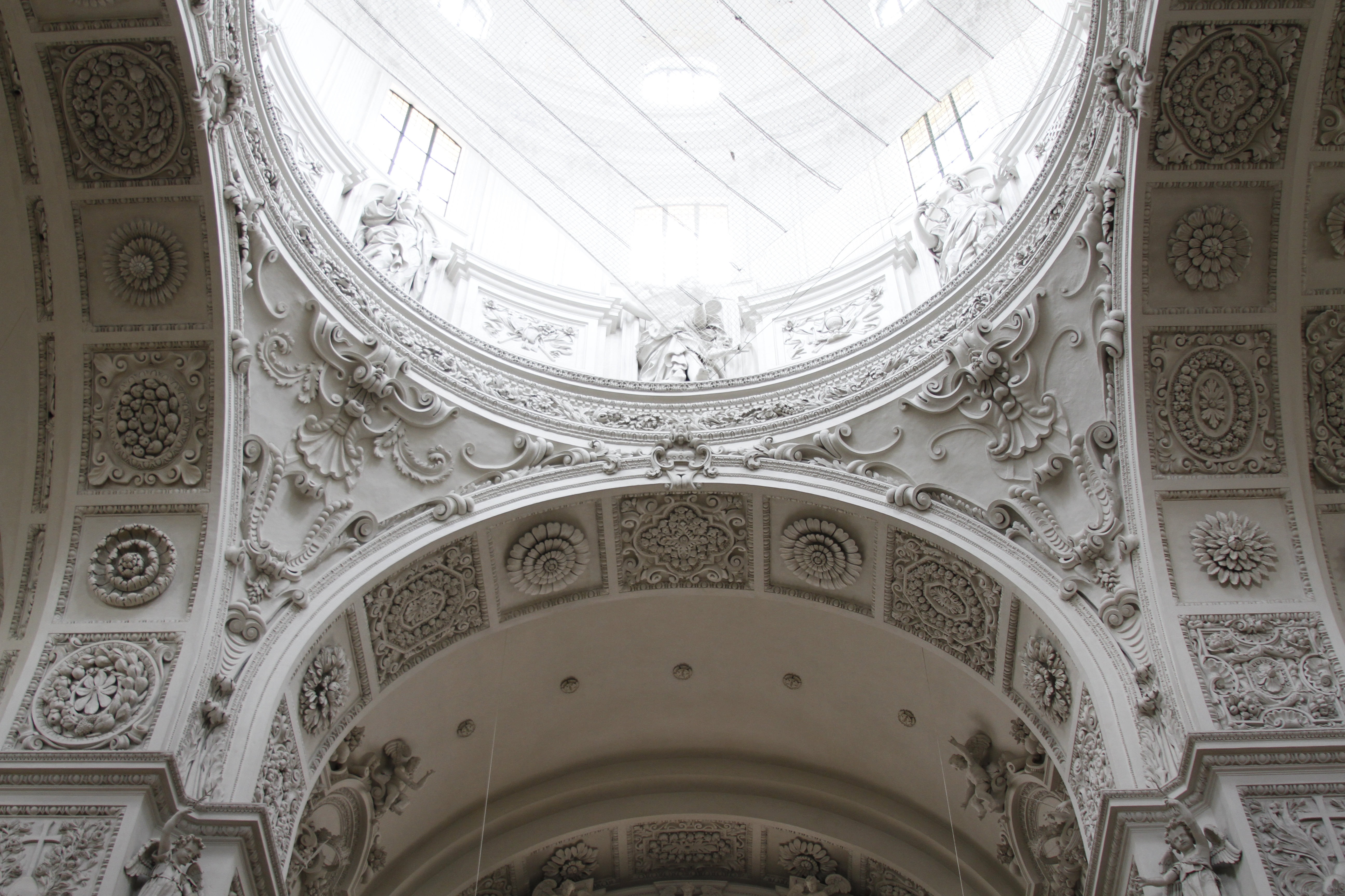 Theatinekirche - Munich - Germany